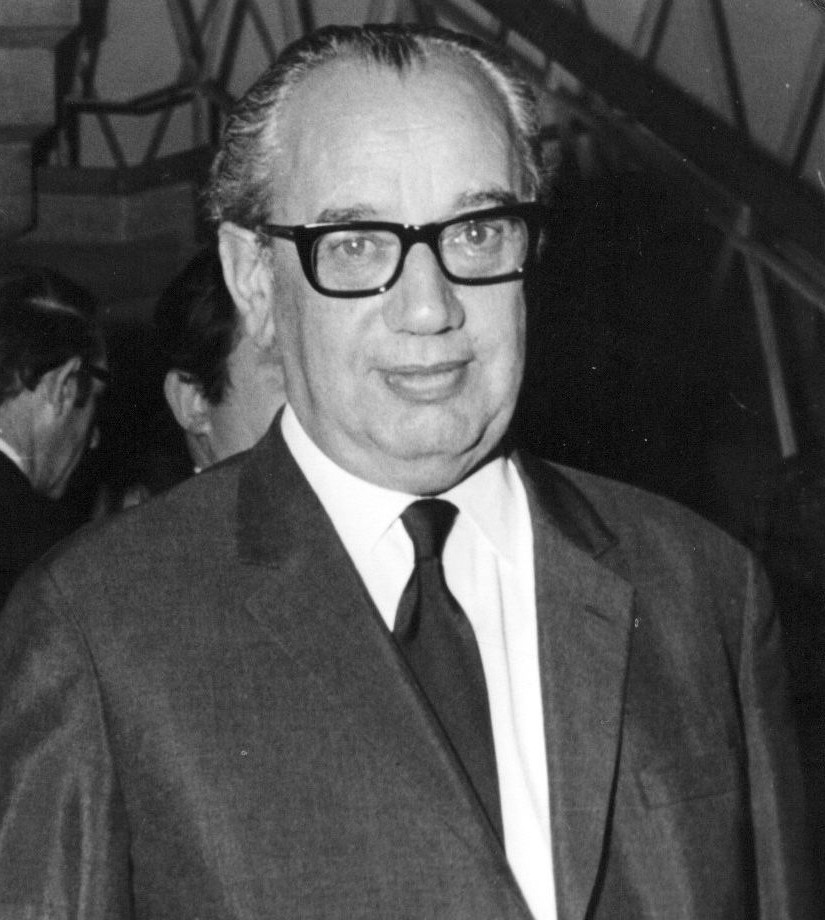 אריה דיסנצ'יק